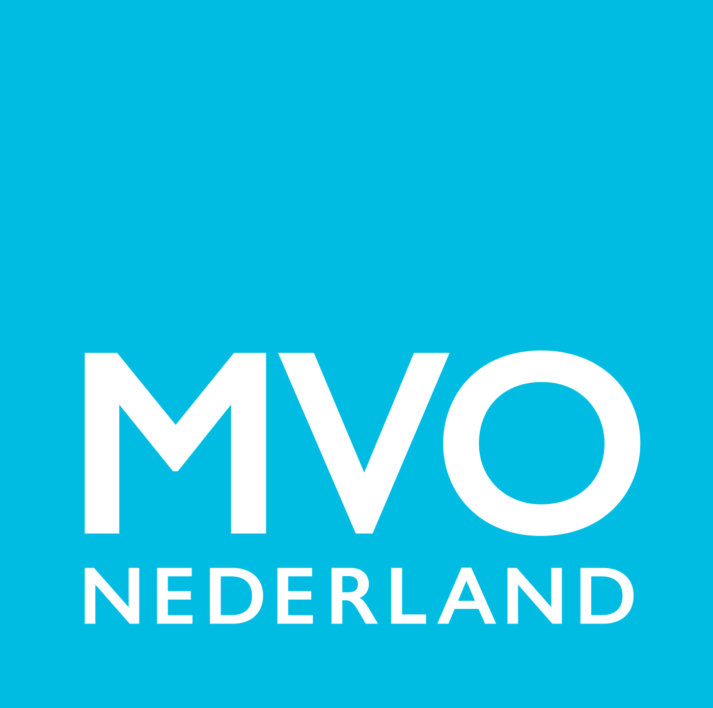 Logo MVO Nederland conform nieuwe huisstijl. MVO = maatschappelijk verantwoord ondernemen